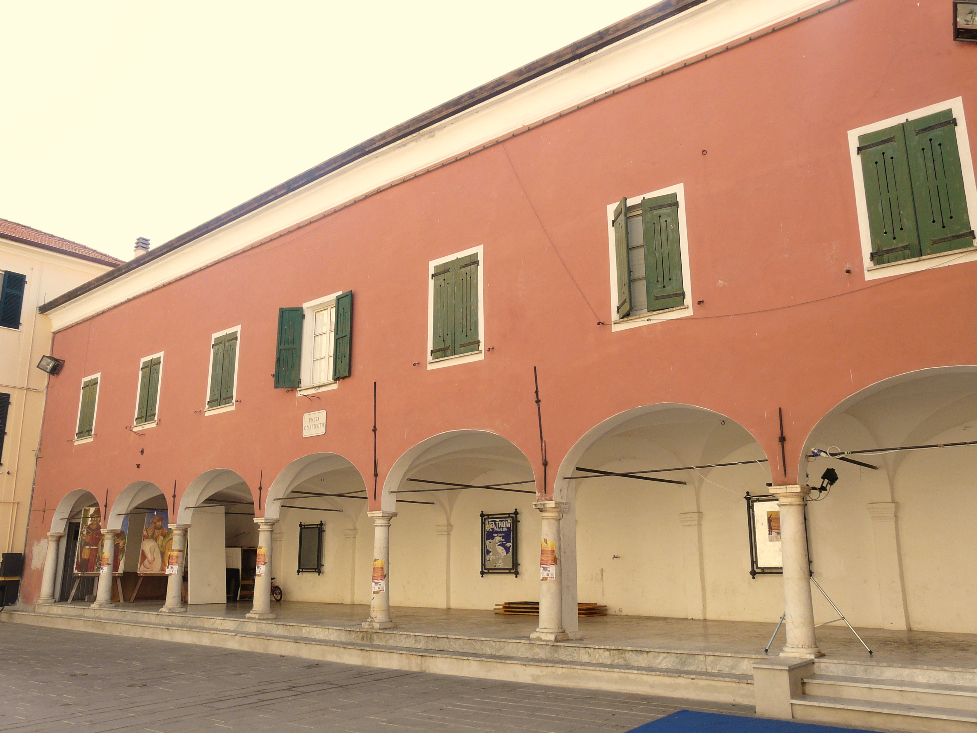 Loggia di Fosdinovo, Toscana, Italia